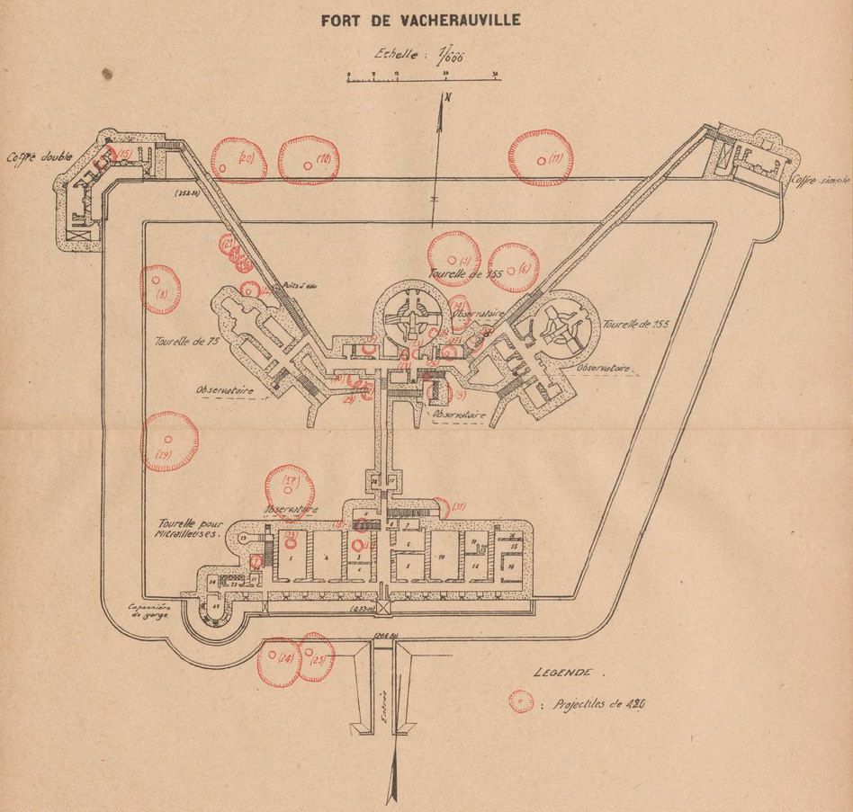 Plan du fort de Vacherauville avec les principaux impacts d'obus (ceux de gros calibre) reçus en 1916.